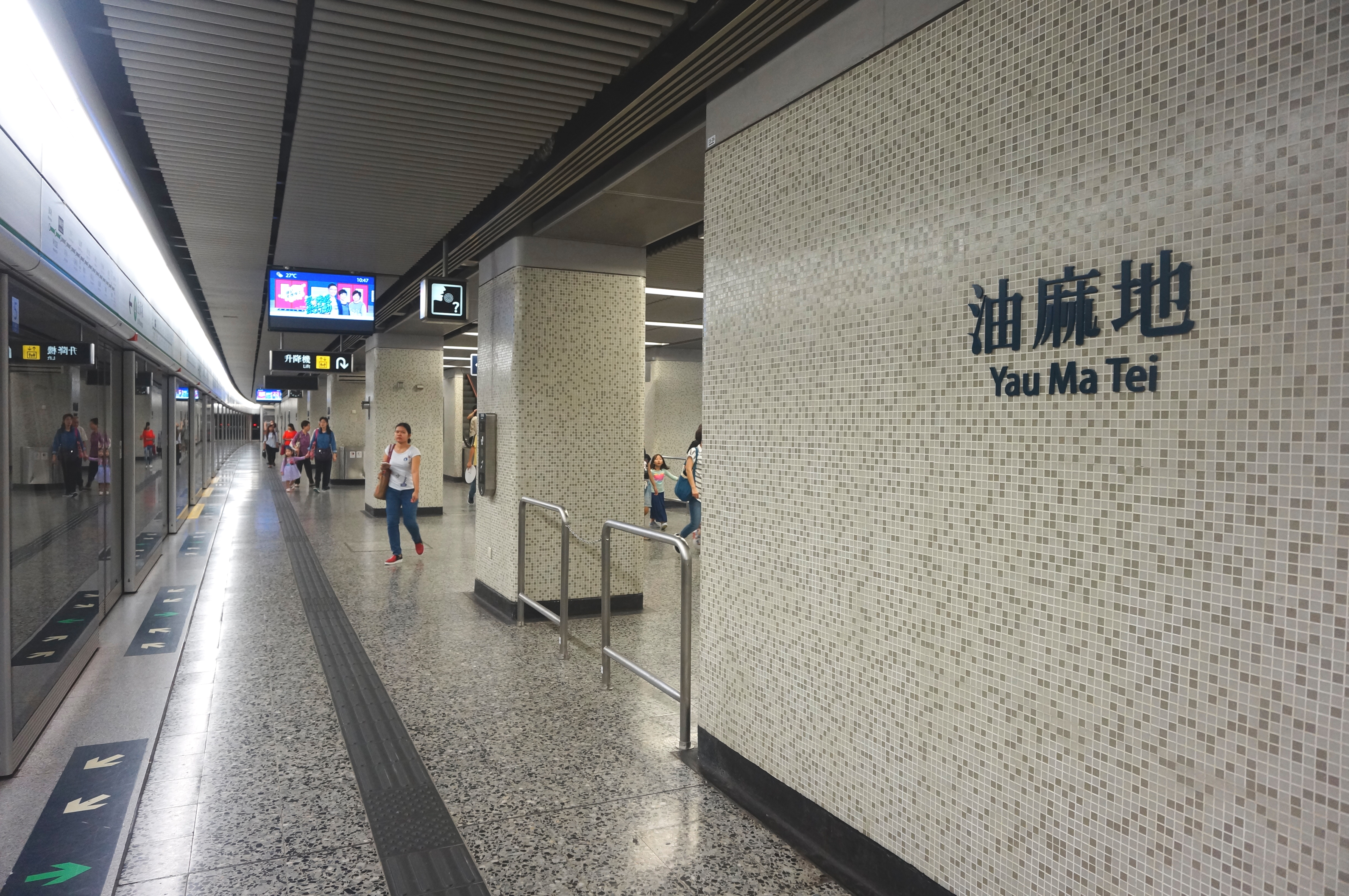 港鐵油麻地站月台